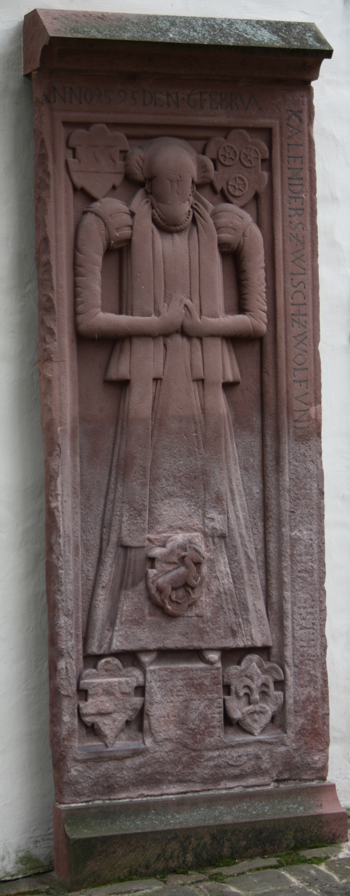 katholische Pfarrkirche St. Michael in Lohr am Main im Landkreis Main-Spessart (Bayern)